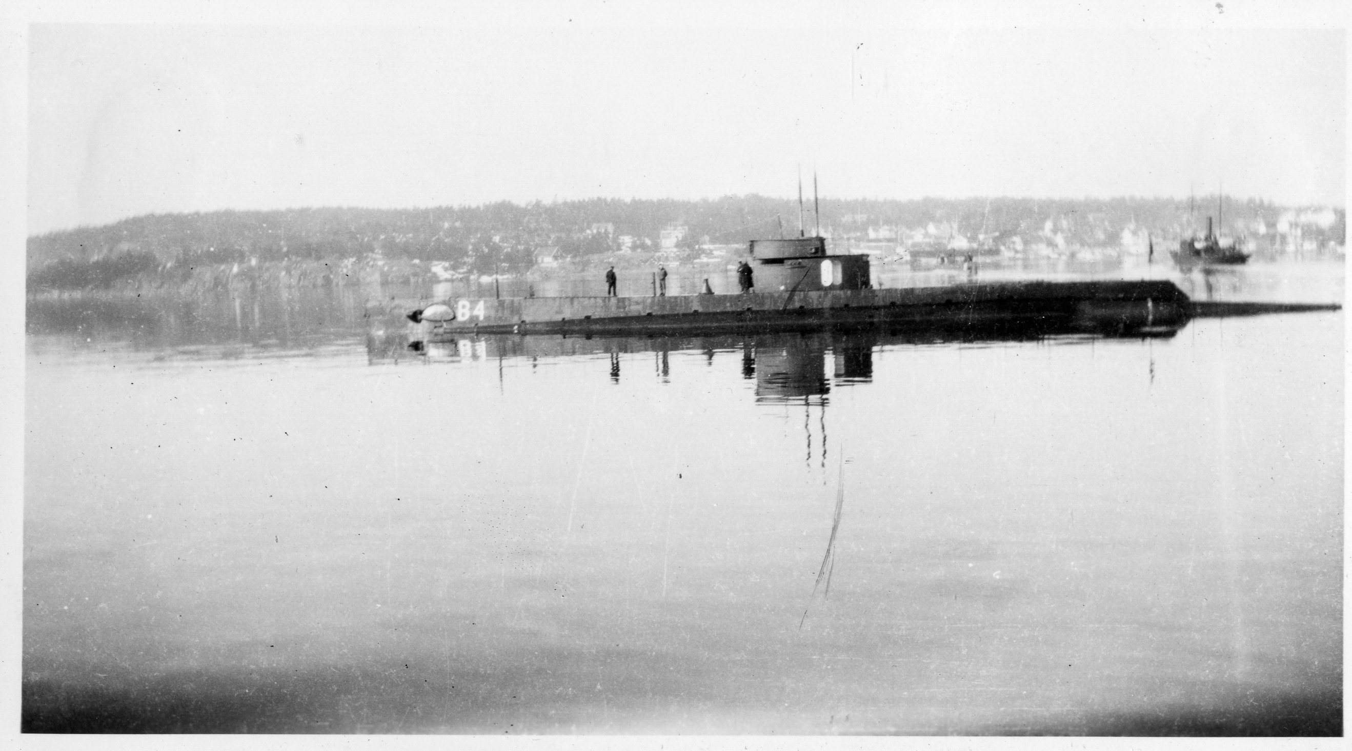 Bildet er hentet fra Arkivverket. Tatt i Valløbukten Arkivinstitusjon : Statsarkivet i Kongsberg Arkivnavn : Telemark politikammer Sted : Norge, Vestfold, Tønsberg, Valløbukten Emneord: Skip, Hav, Båt, Ubåt Avbildet